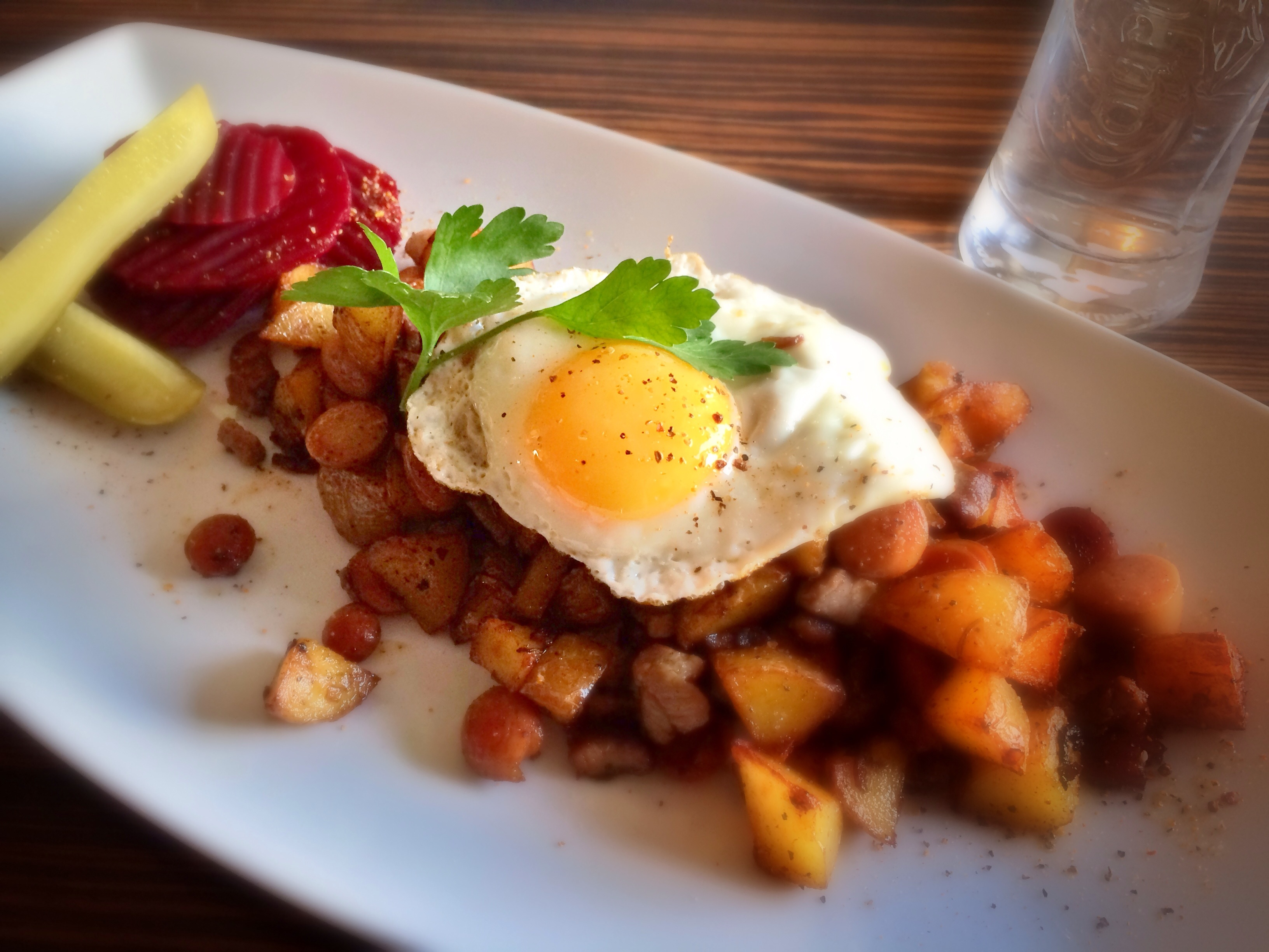 Stockholm, Sweden